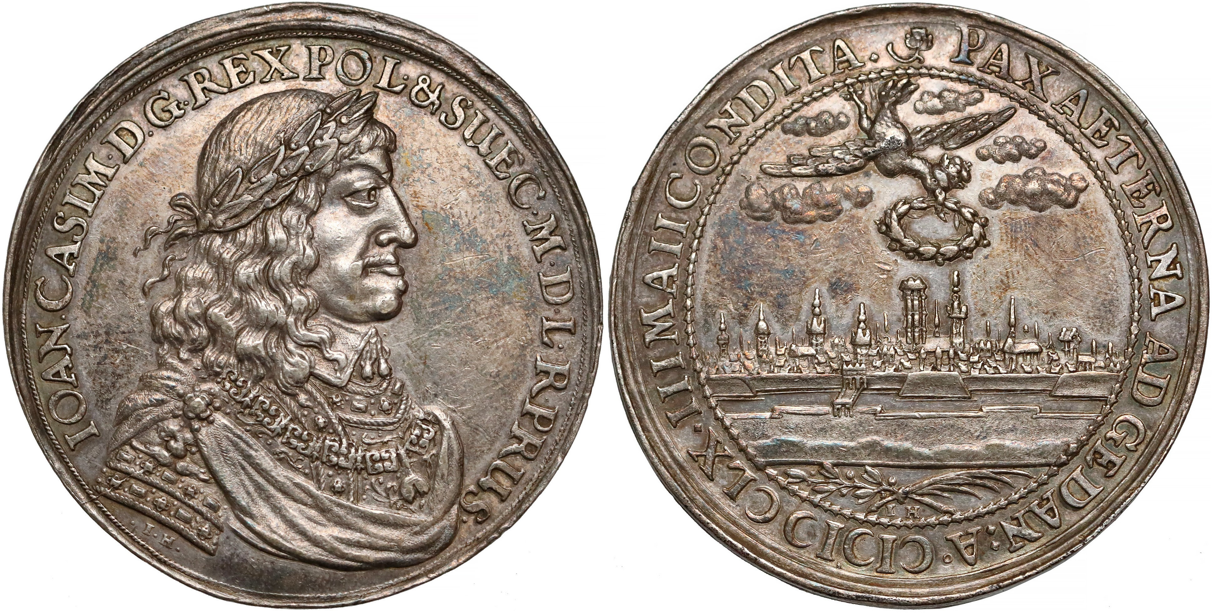 Donatywa Gdańsk 1660 srebro